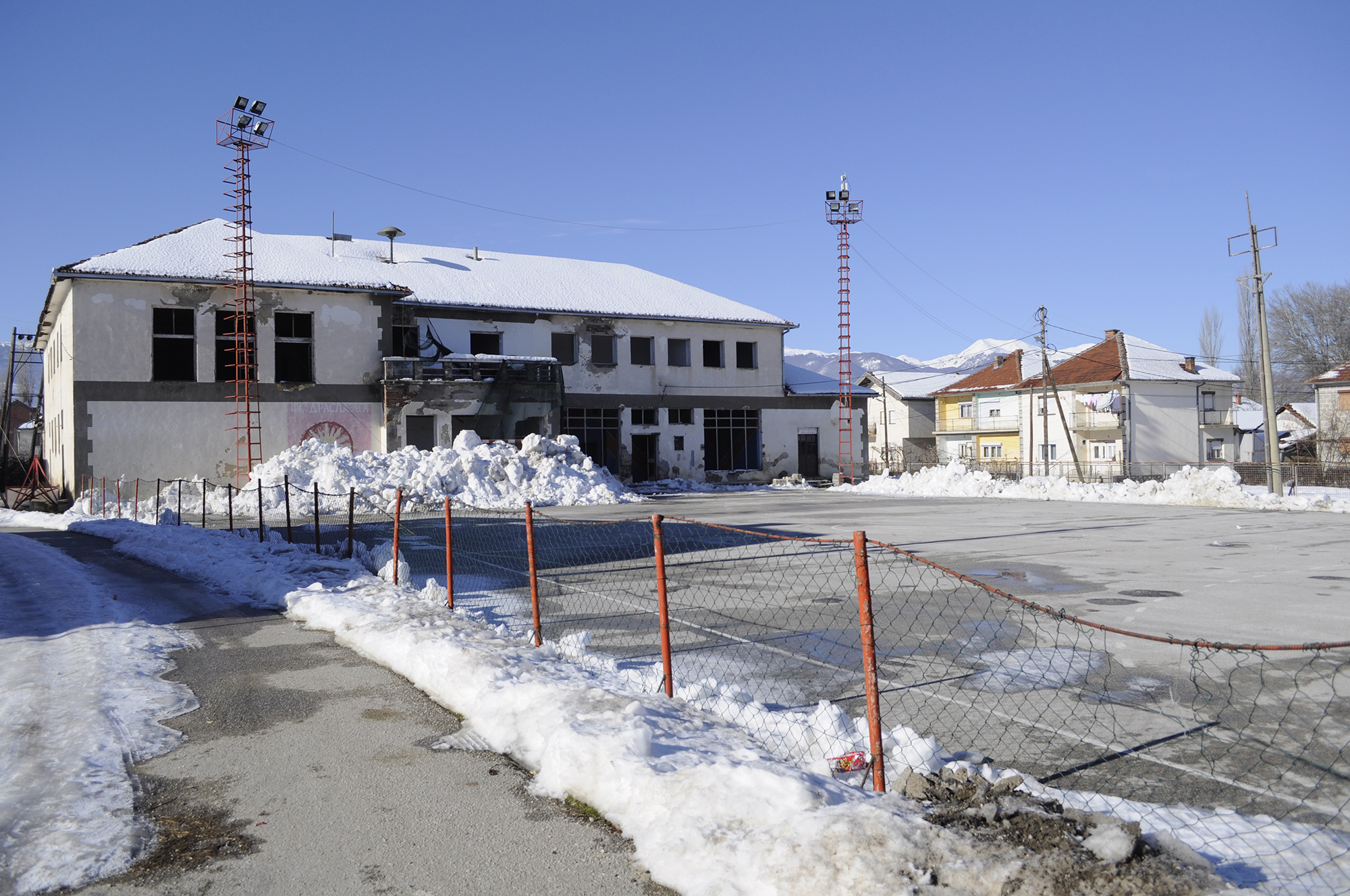 Драслајца средсело, назима